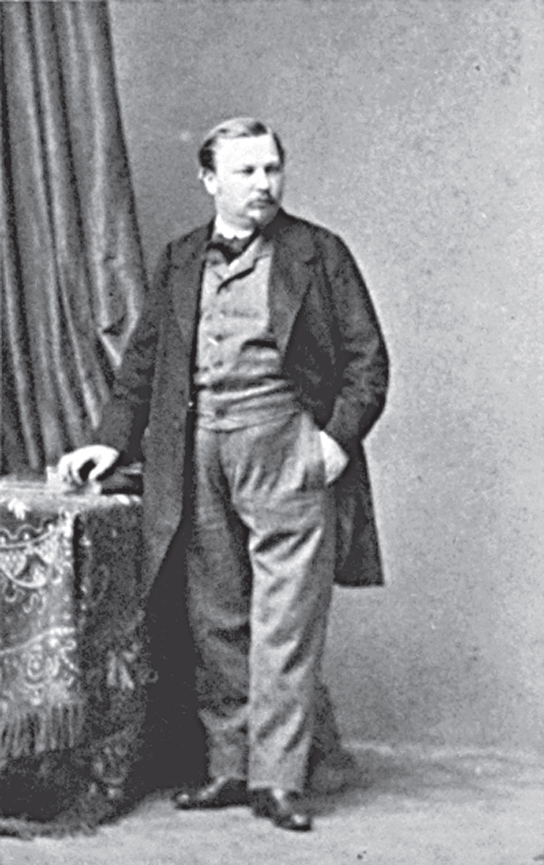 Беларуская (тарашкевіца): Партрэт Канстантына Кашыца (Kanstantyn Kašyc)